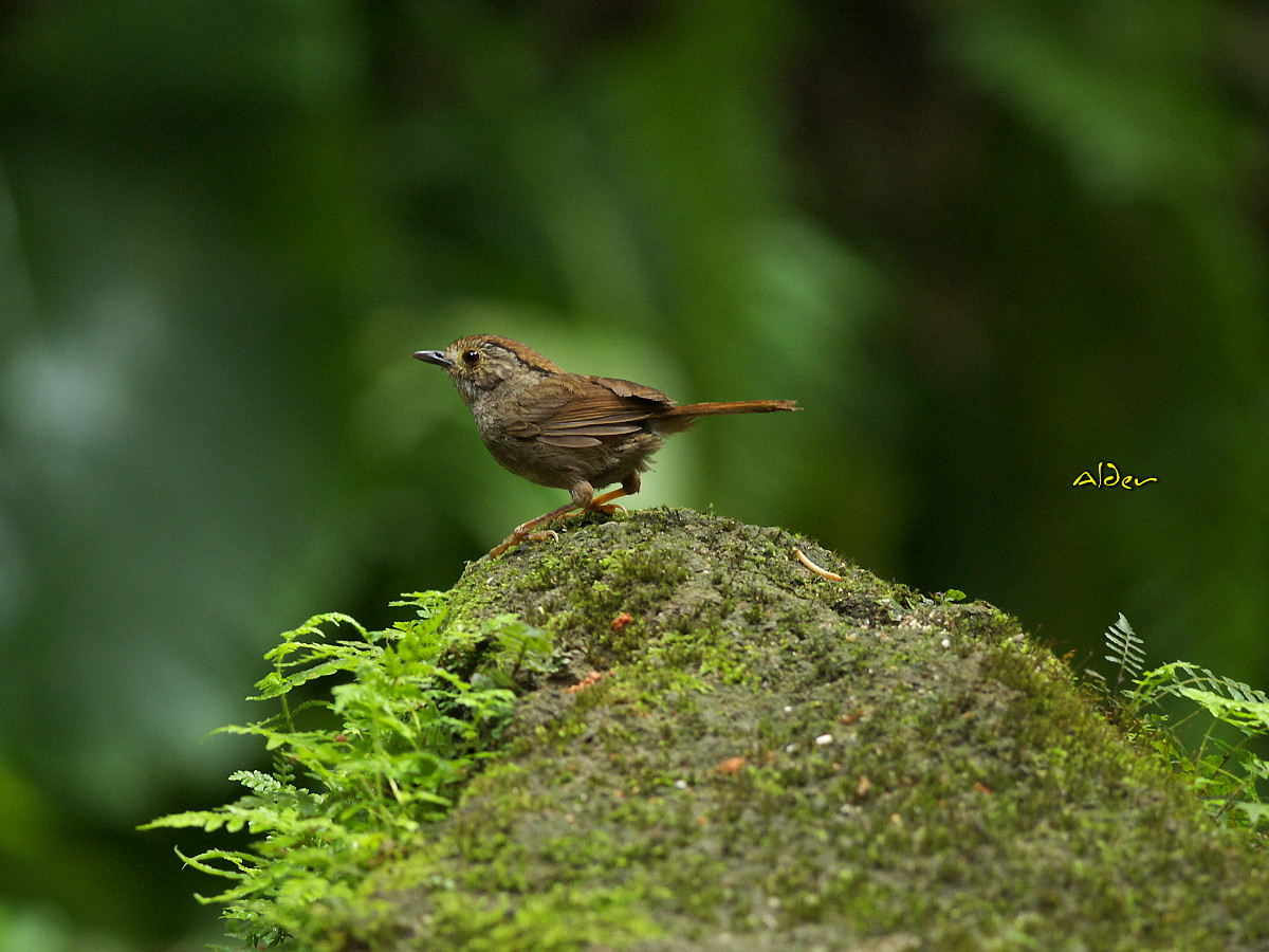 頭烏線